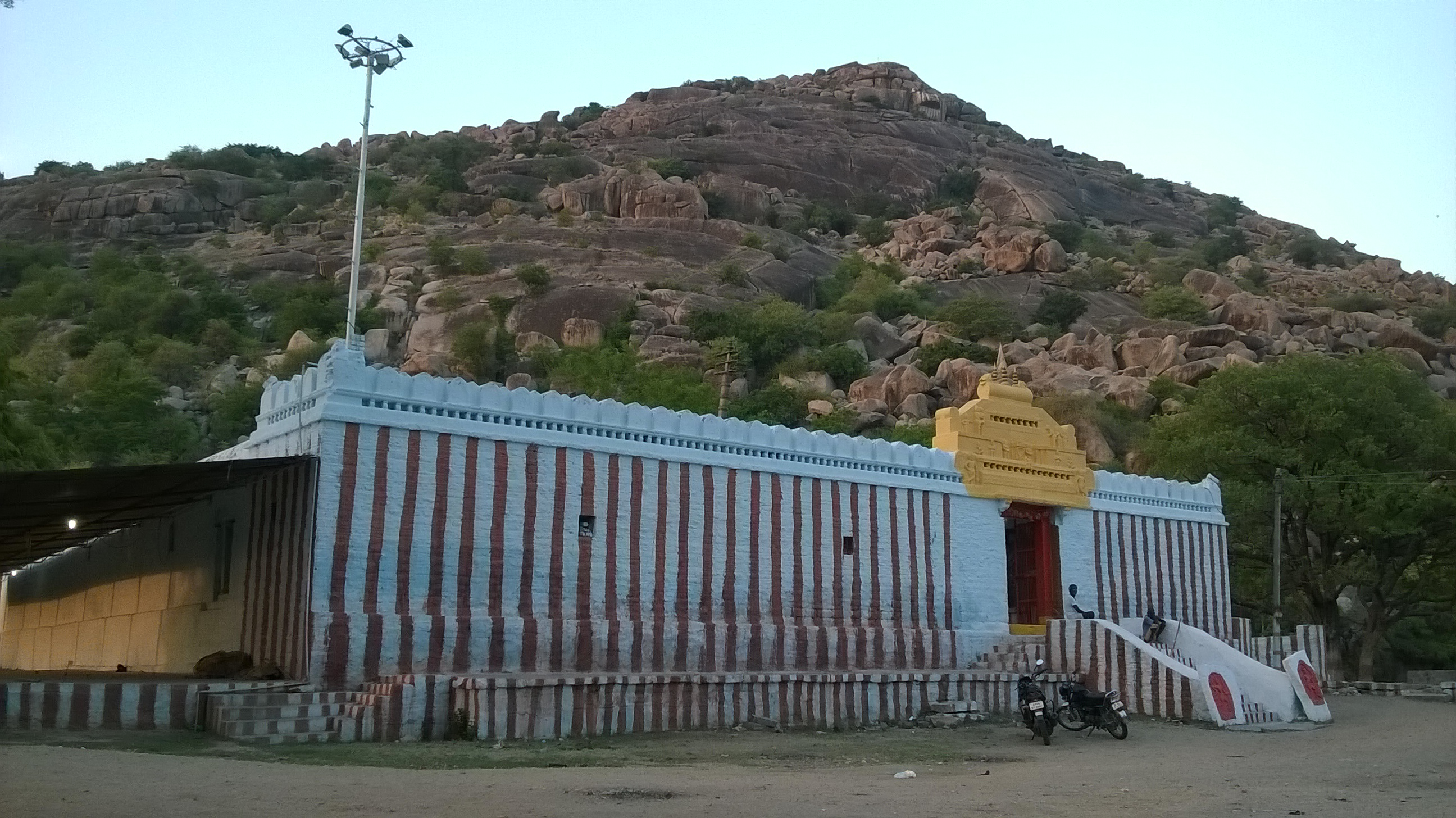 శ్రీరామలింగేశ్వరస్వామి దేవాలయం, కందూరు